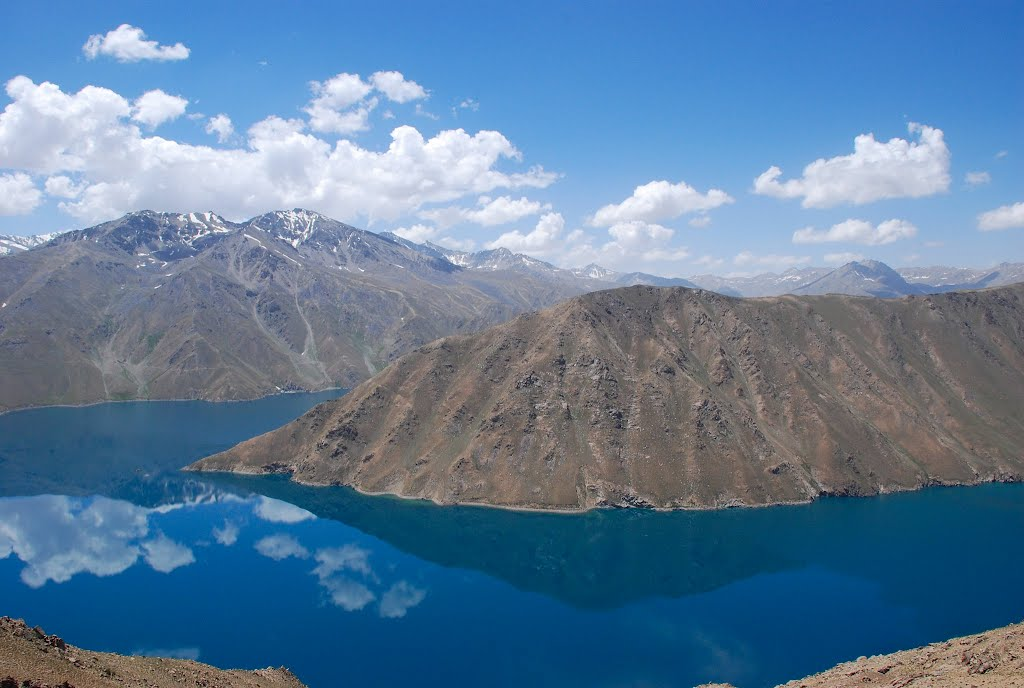 دریاچه شیوه, شِغنان